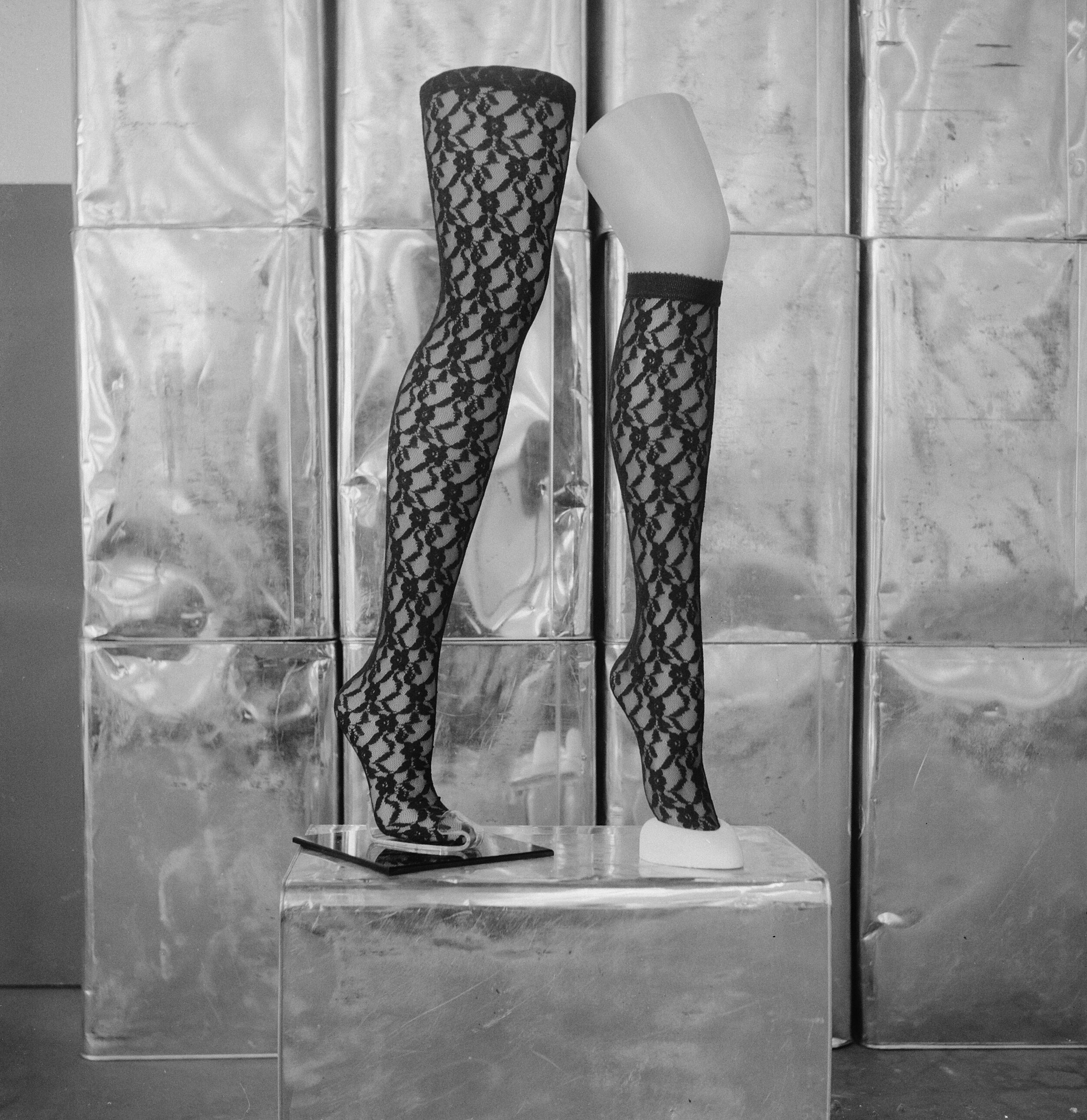 Collectie / Archief : Fotocollectie Anefo Reportage / Serie : [ onbekend ] Beschrijving : Opdracht Huishoudbeurs Datum : 1 mei 1964 Trefwoorden : huishoudbeurzen, kousen, panty's Fotograaf : Gelderen, Hugo van / Anefo Auteursrechthebbende : Nationaal Archief Materiaalsoort : Negatief (zwart/wit) Nummer archiefinventaris : bekijk toegang 2.24.01.03 Bestanddeelnummer : 916-3810 Reacties Geplaatst door Geertje op 09 mei 2015 - 14:01. Nieuwste rage: kanten kousen. Een Nederlandse kousenfabriek toont zowel de kniekous als de gewone kousenlengte voor het eerst op de Huishoudbeurs NB. panty's is niet het juiste trefwoord